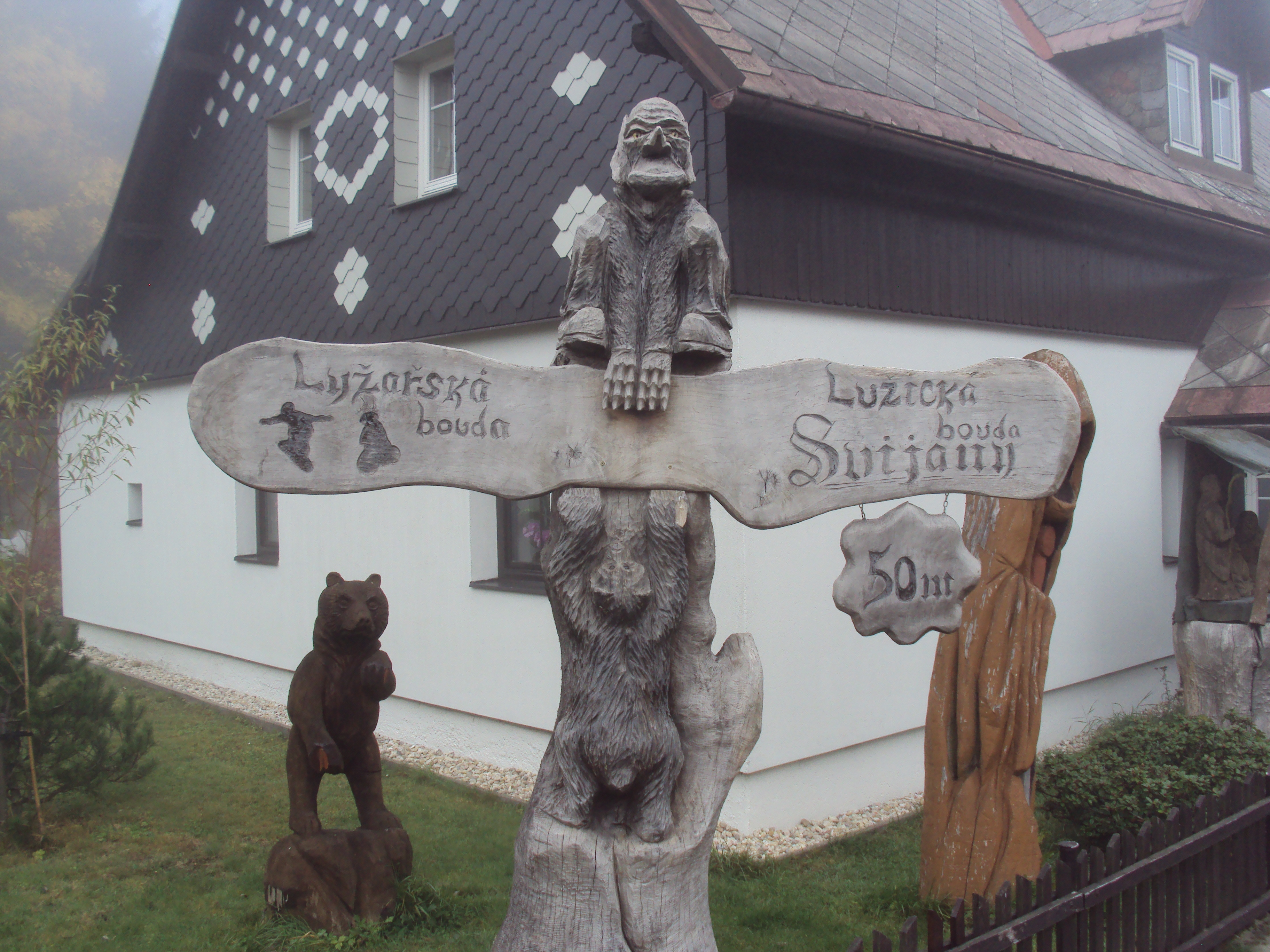 Ukazatel mezi chatami v Myslivnách pod Luží